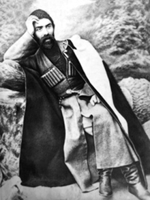 Коста Хатегуров